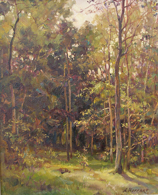 Пейзаж от Александър Алексиев - Хофарт